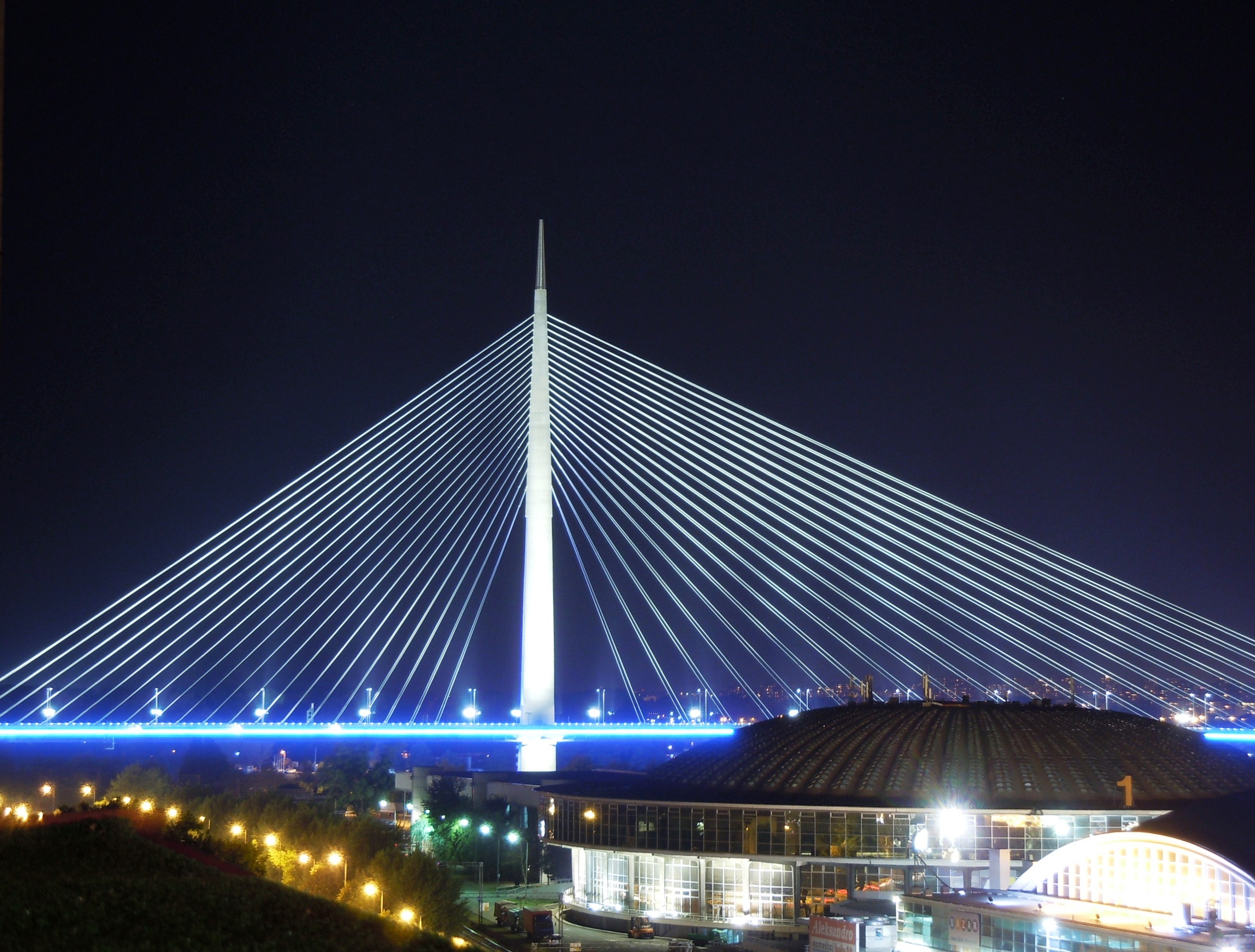 Slika novog mosta